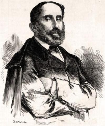 Giorgio Pallavicino Trivulzio, prodittatore di Napoli Immagine tratta da "L'illustration - Journal universel", Parigi, 1864